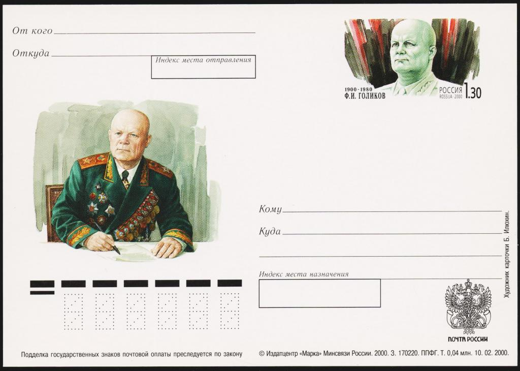 Голиков Филипп Иванович почтовая карточка